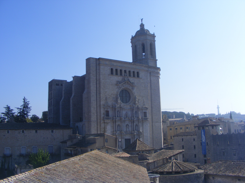 Catedral de Santa Maria (Girona)